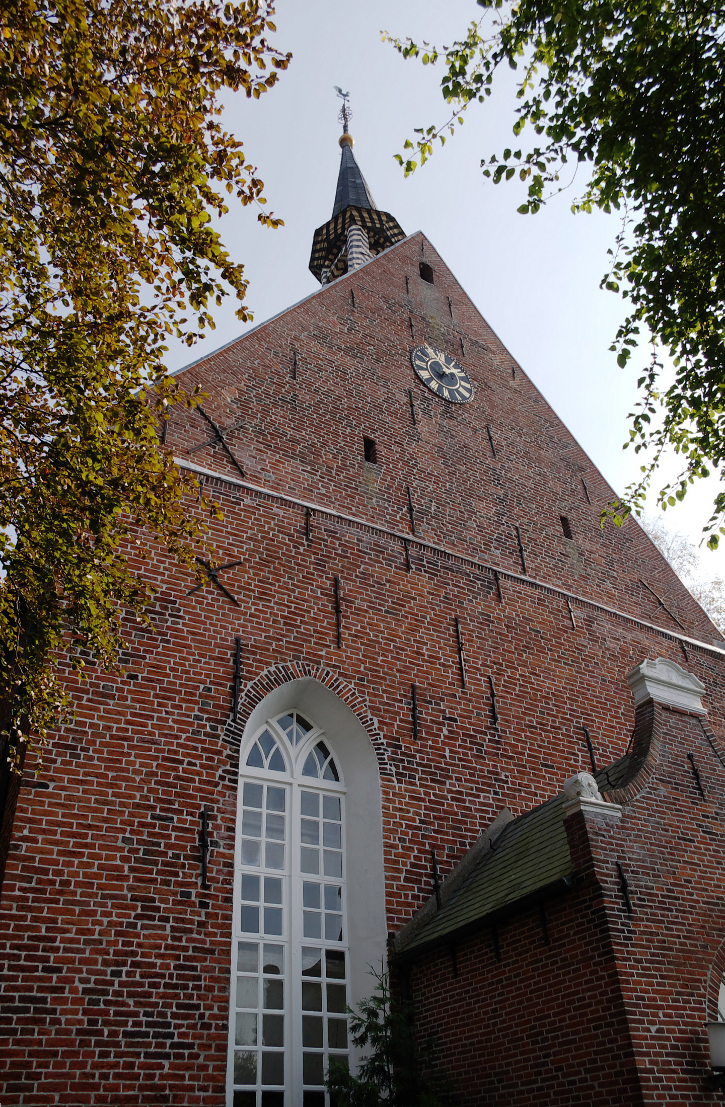 Georgskirche Weener, Emsland